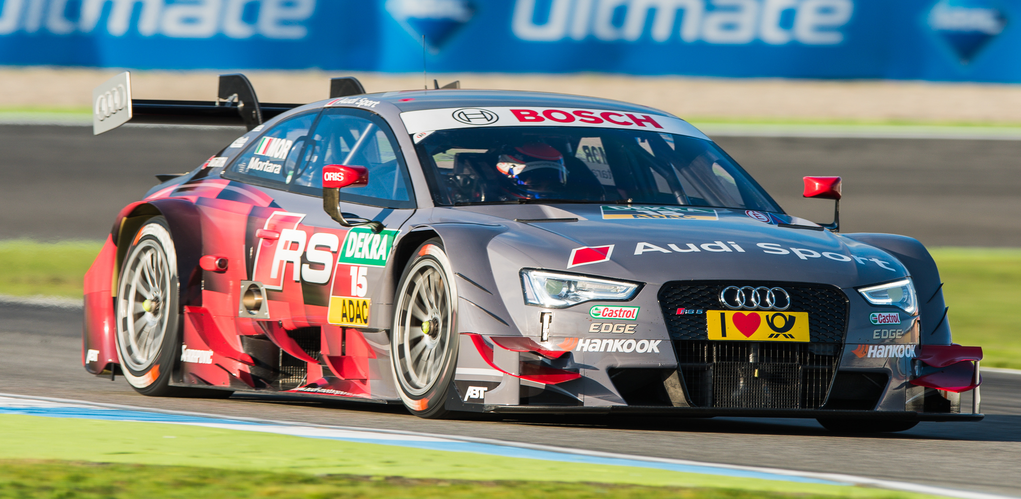 Abt Sportsline GmbH,Audi Sport Audi RS 5 DTM,DTM,Deutsche Tourenwagen Masters,Edoardo Mortara,Hockenheimring,Motorsport